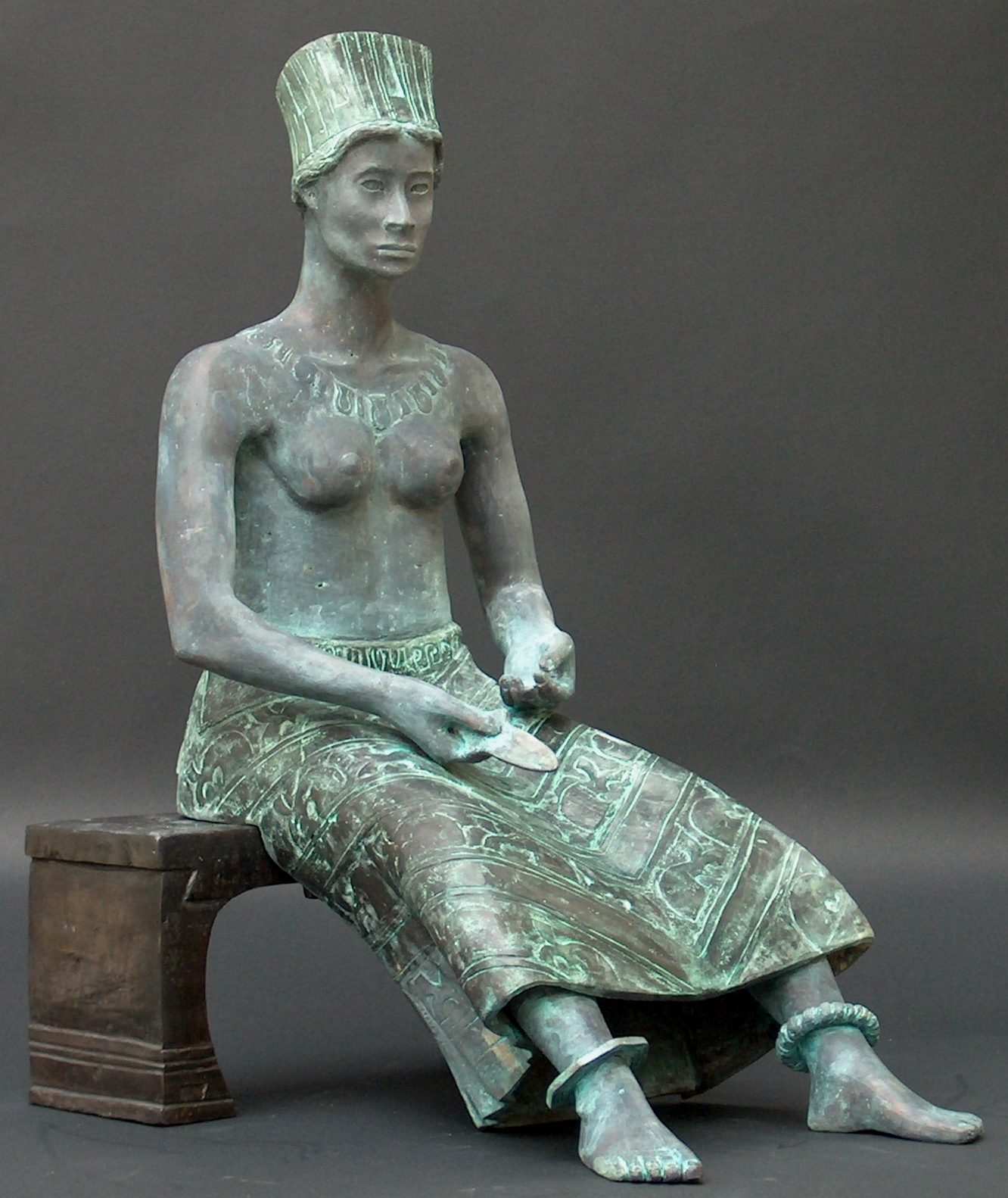 Sculpture en bronze de Didon